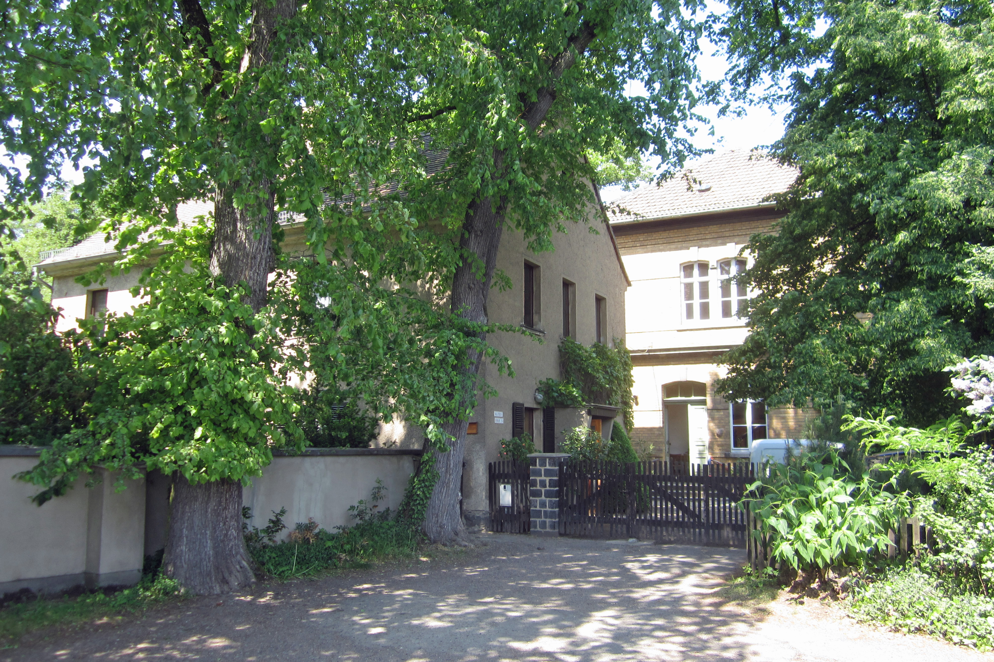 Gemeindehaus Portitz, Zum Birkenwäldchen 1, Leipzig